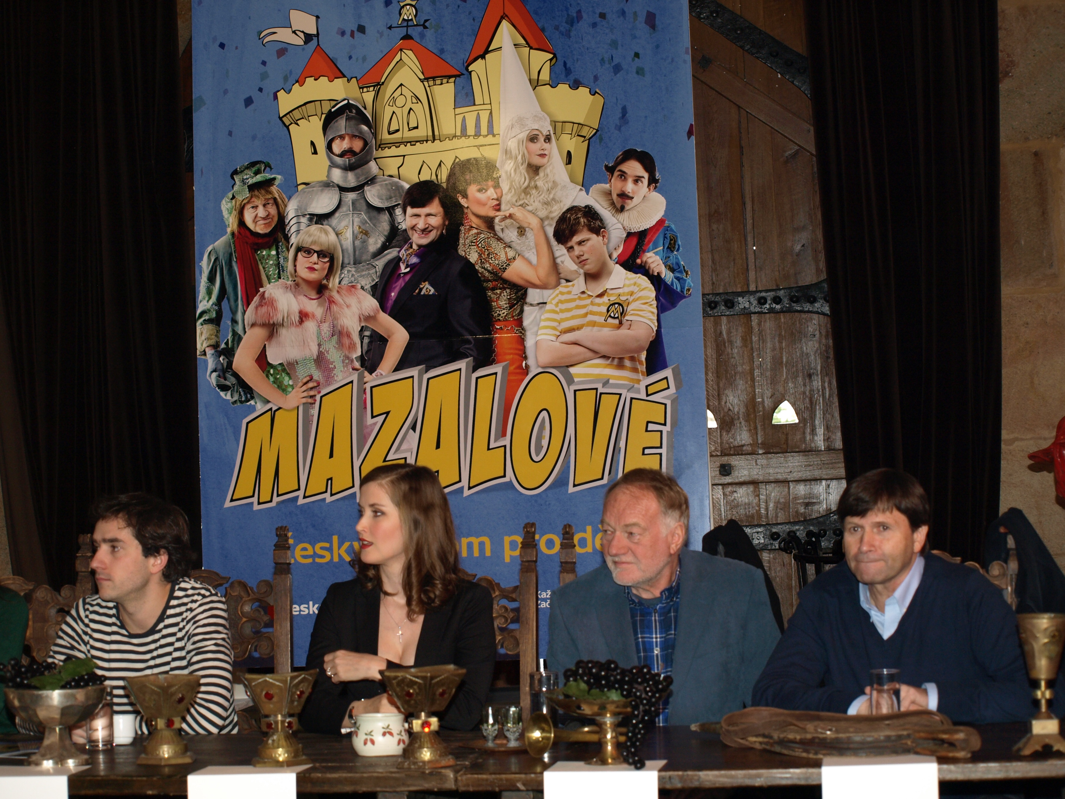 Novinářská konference seriálu Mazalové. Autor: Blanka Borová pro & 10Mpix.cz